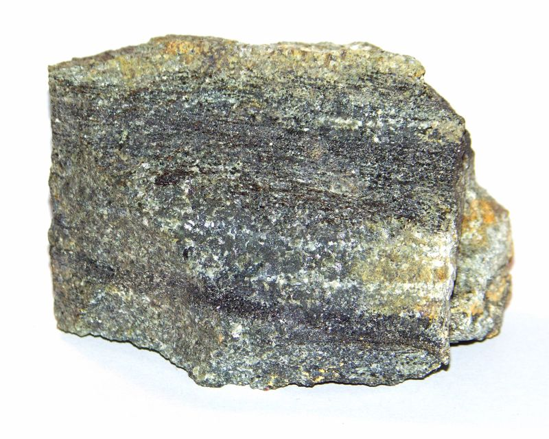 Amfibolit znaleziony jako eratyk z Gór Świętokrzyskich pod Grzywami Korzeczkowskimi w miejscowości Polichno niedaleko Chęcin.